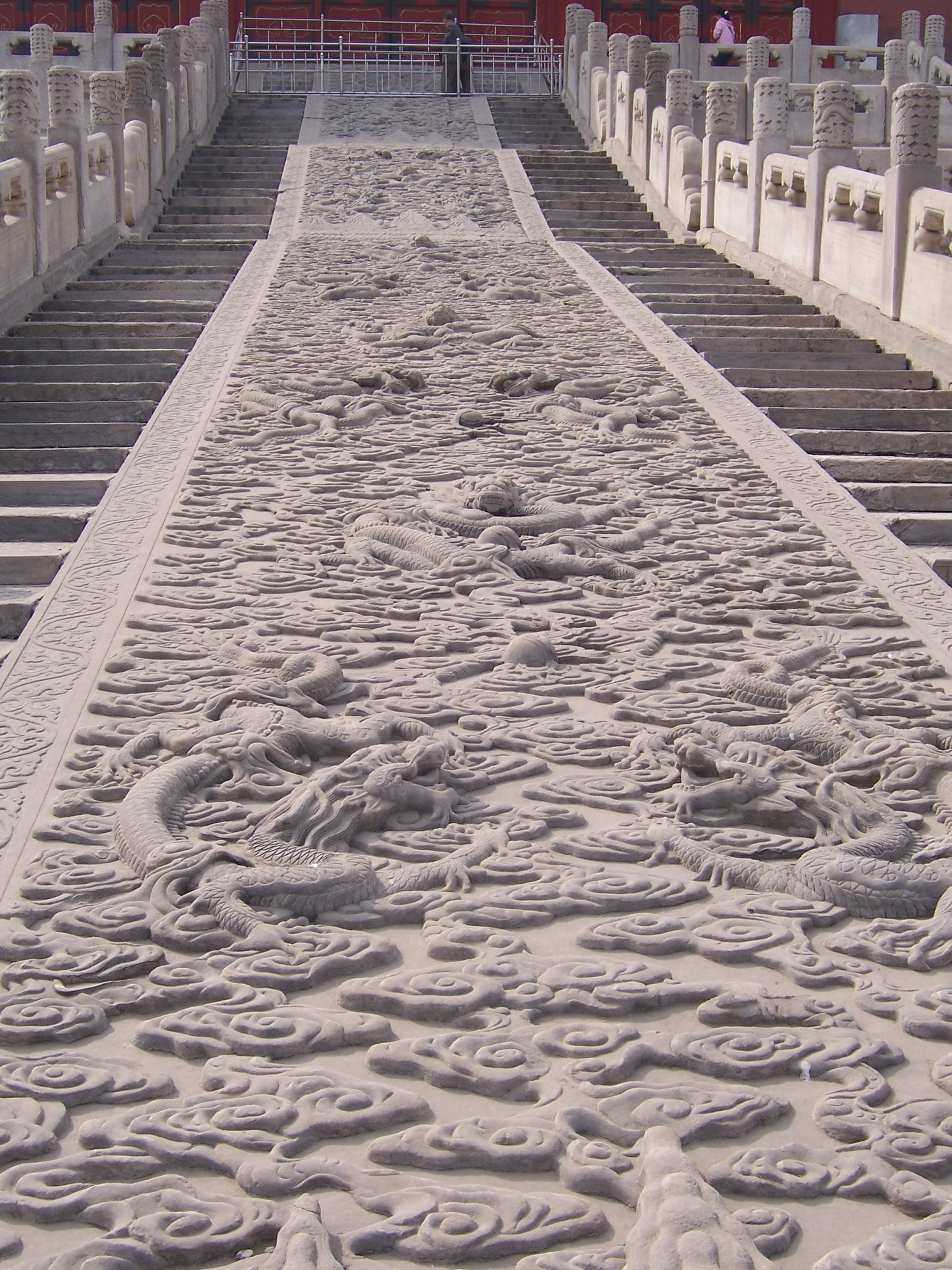 China - Imperial Palace 11